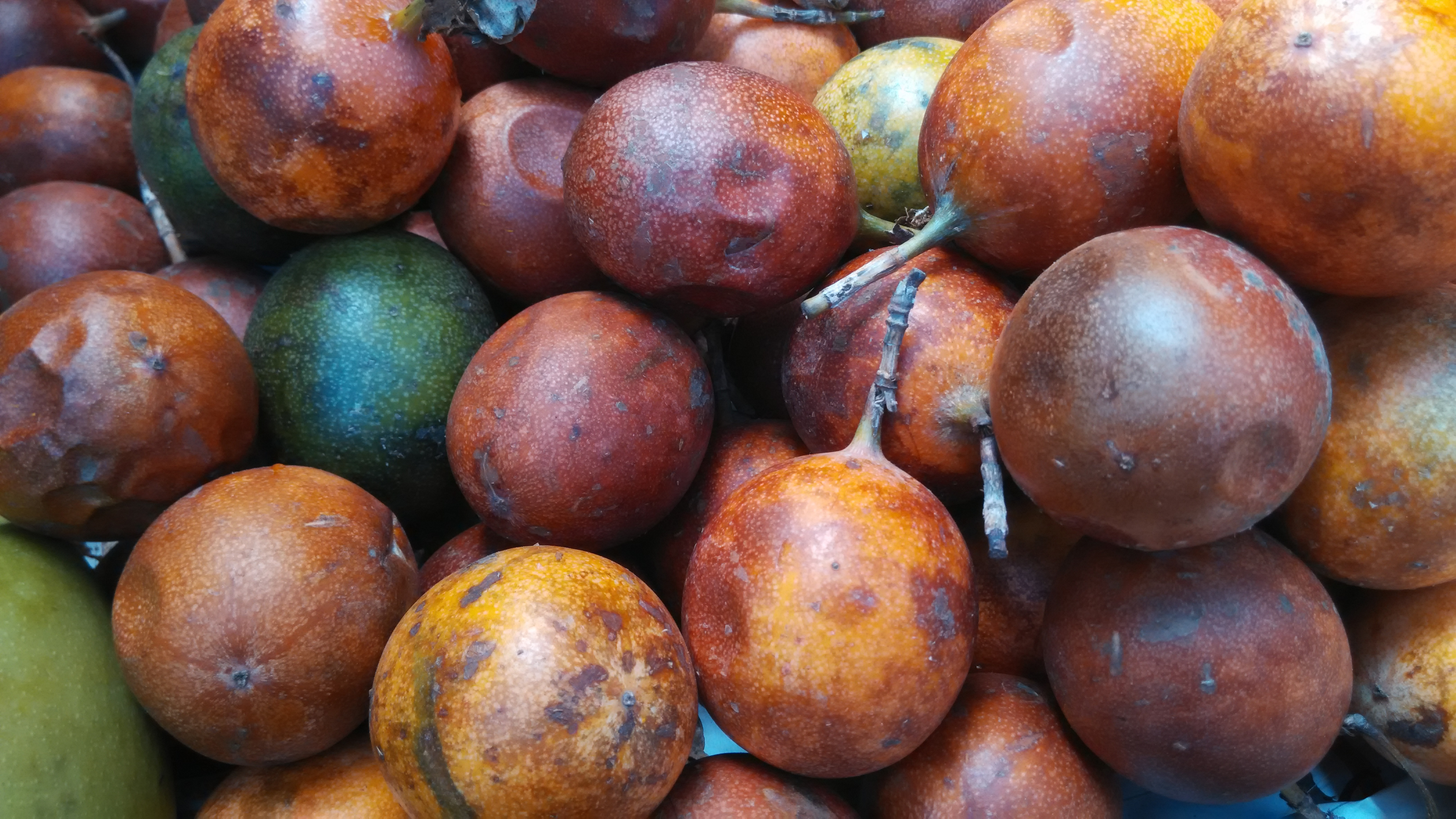 பேசன் பழம்.